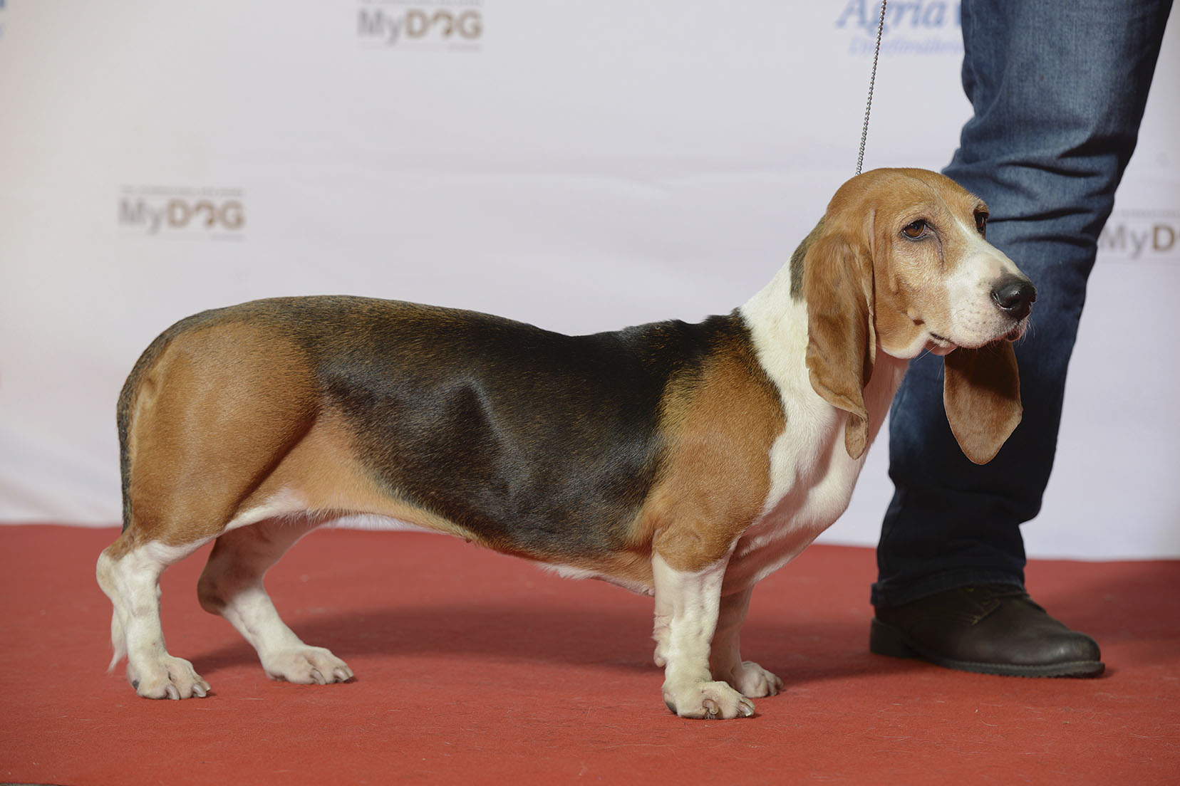 Grupp 6 BASSET ARTÉSIEN NORMAND, Skogvaktarens Queen Sally MyDOG, Nordens största hundevenemang